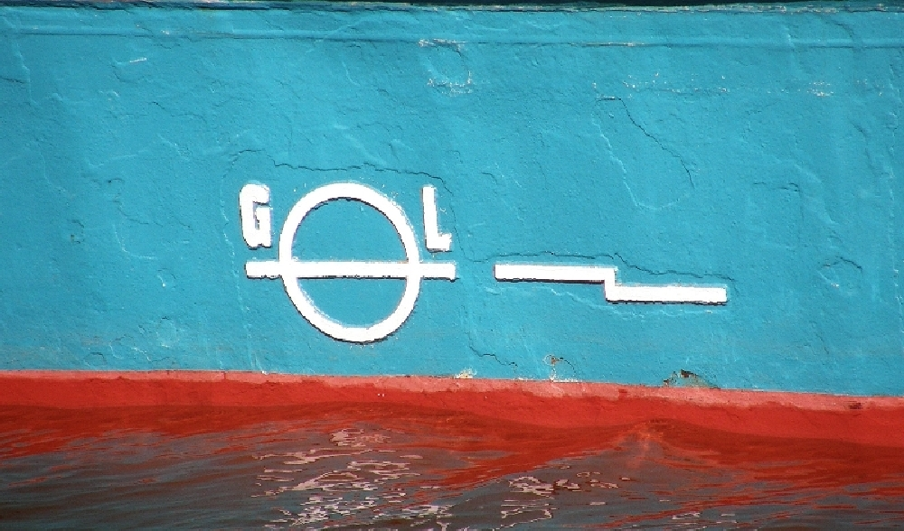 Markierungen des Germanischen Lloyd auf Schiffen (Lademarke bei Süß / Salzwasser)